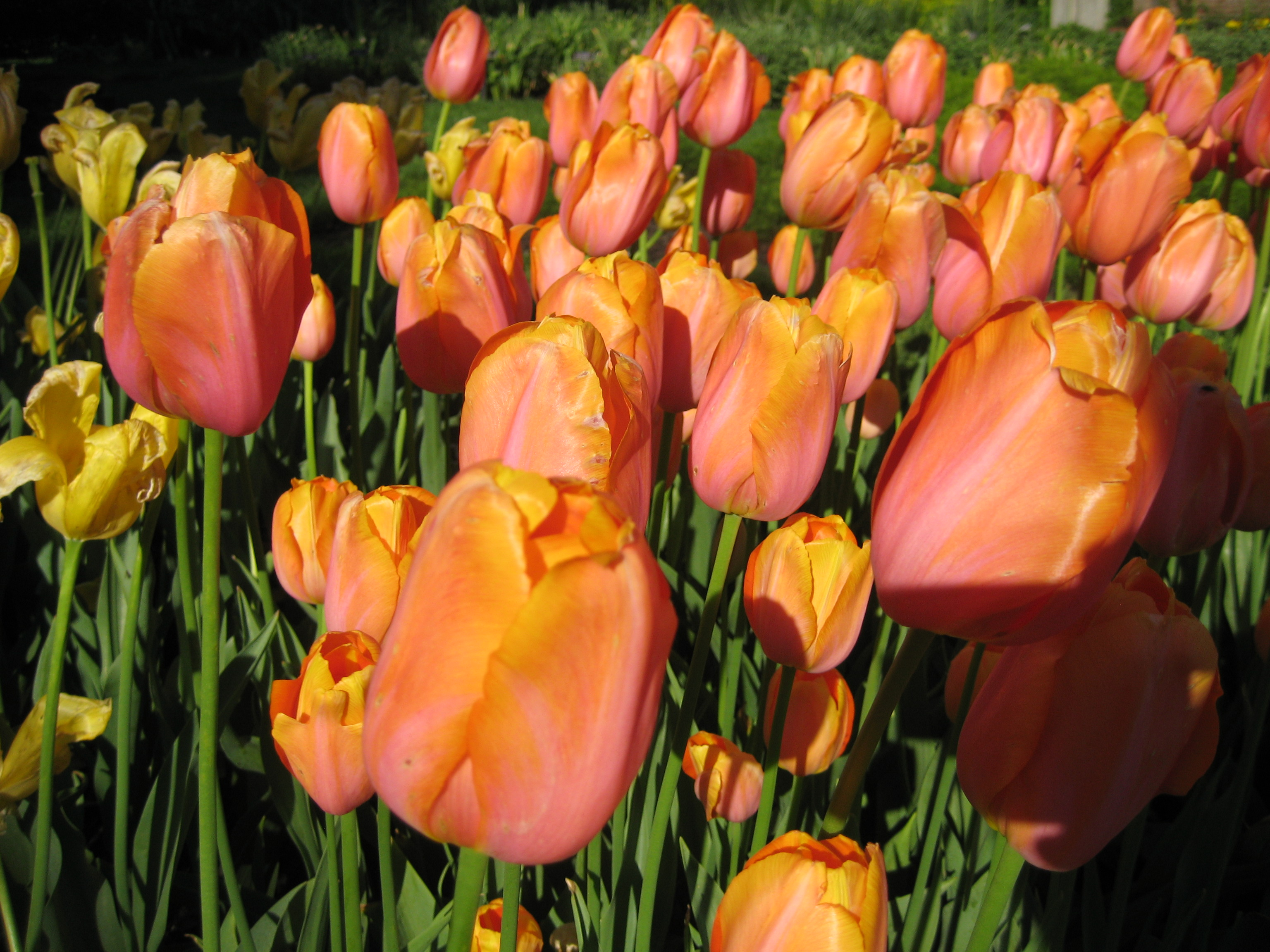 Tulipa Liliaceae